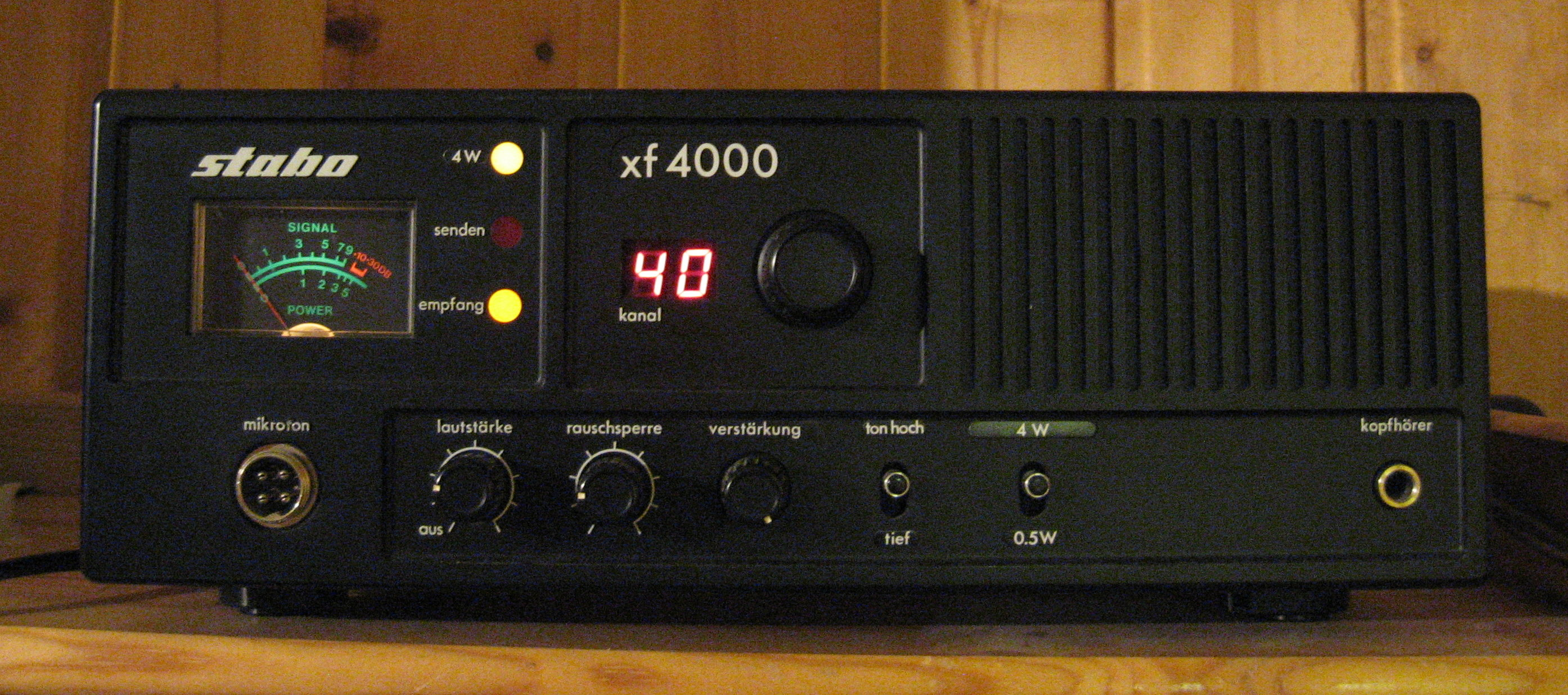 CB-Funk Gerät Stabo XF4000 Heimstation 40 Kanäle FM